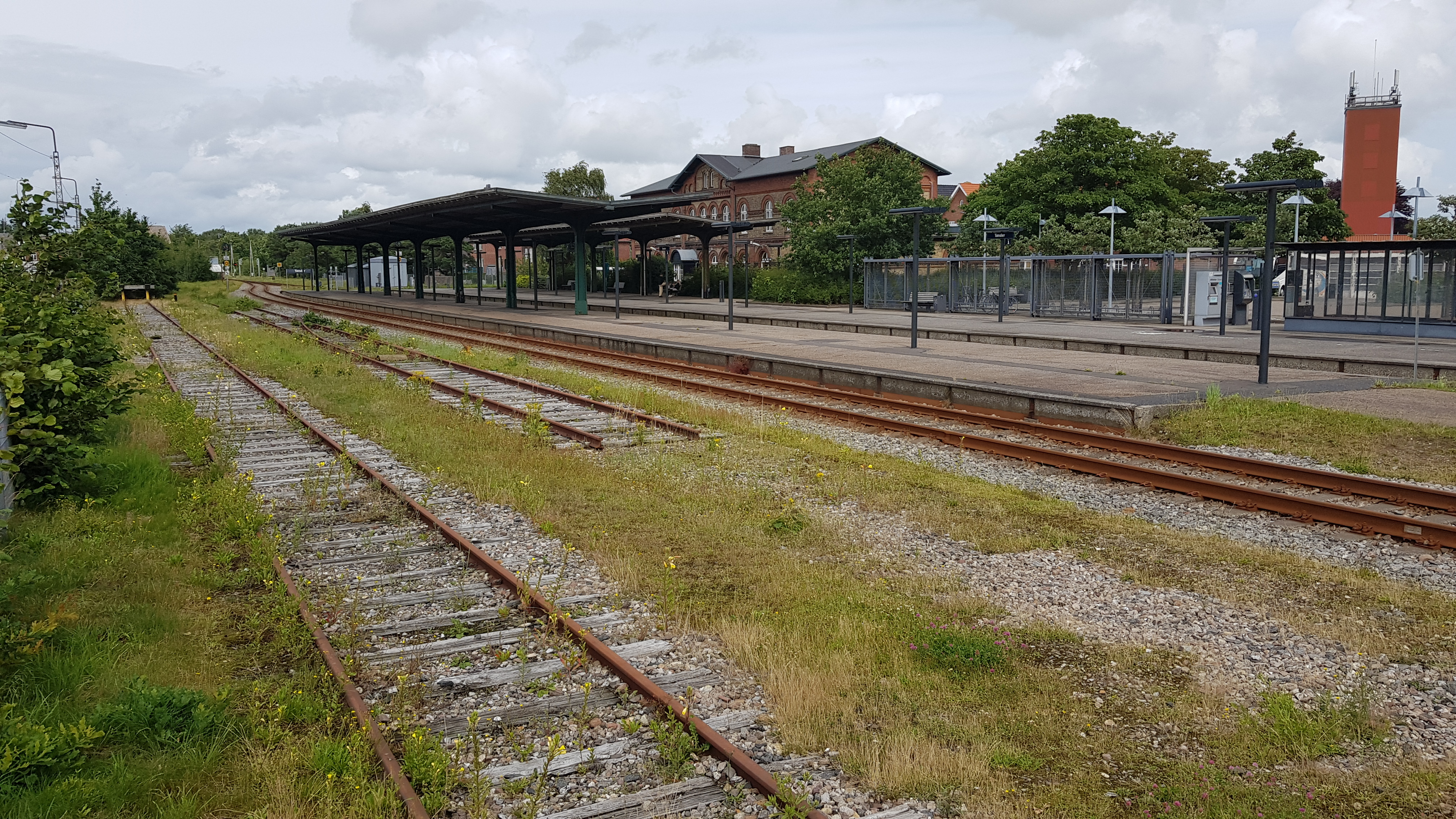 Tønder Station